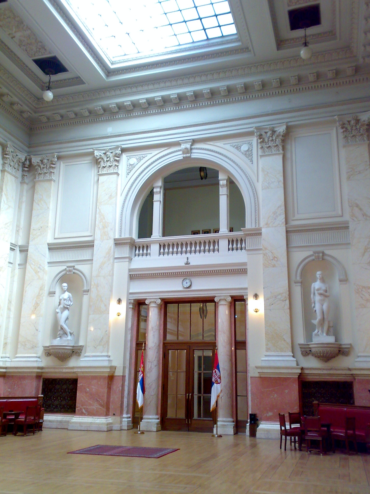 Serbian parliament in Beograd.